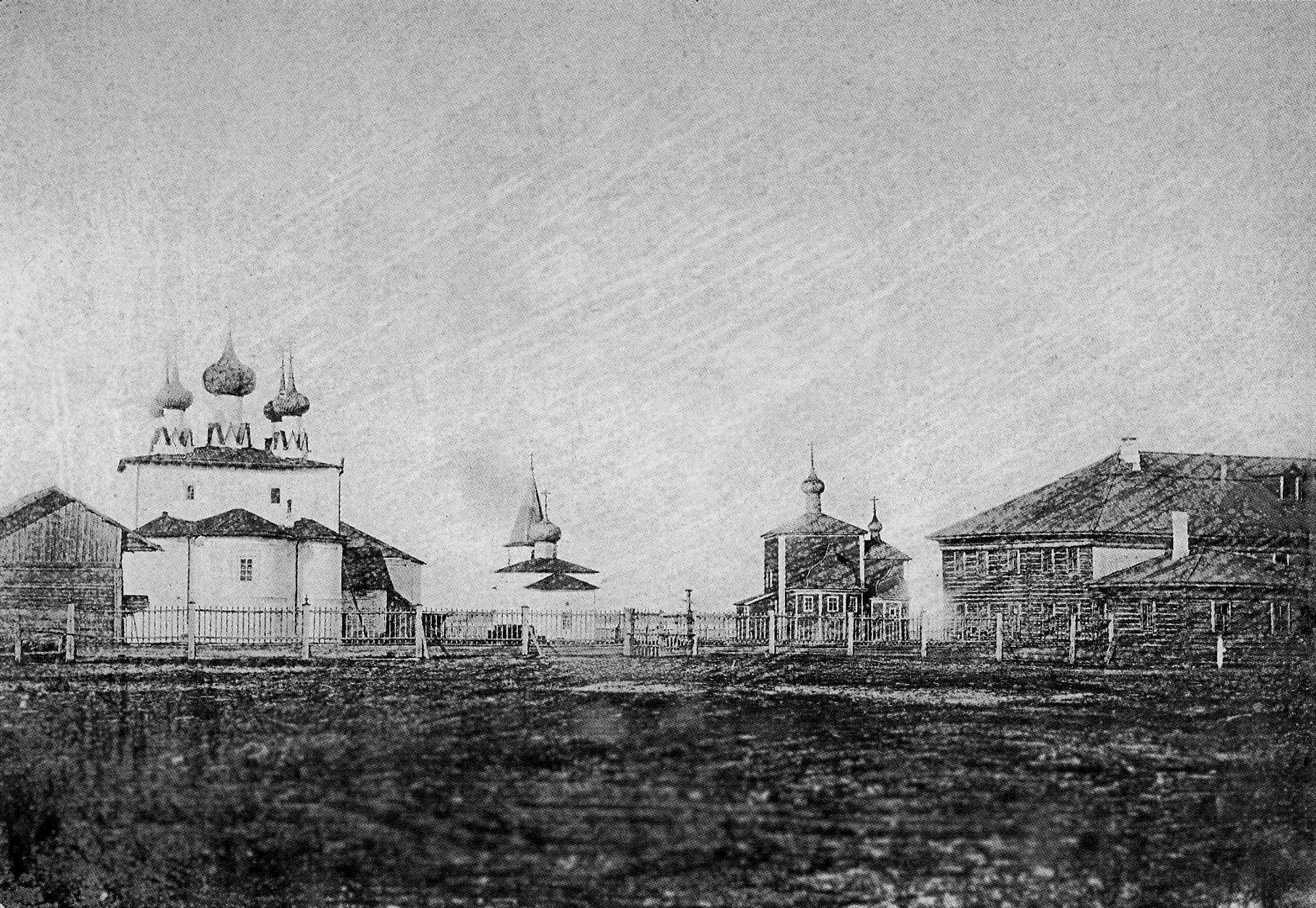 Архангельский уезд. Пертоминский монастырь. Вид с восточной стороны.